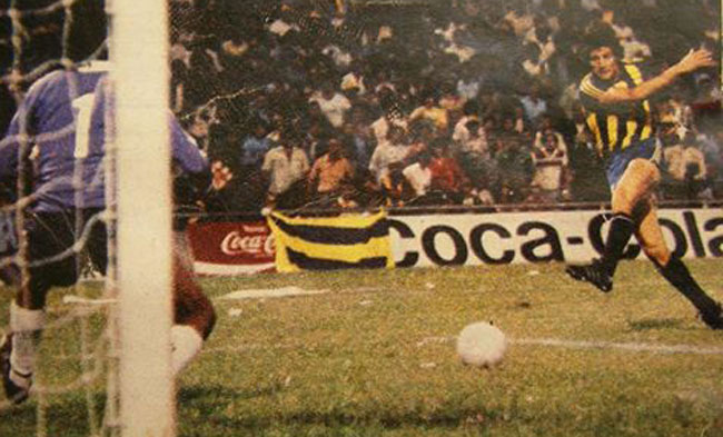 18 de diciembre de 1980; partido final de ida entre Rosario Central y Racing de Córdoba por el Nacional 1980. Guillermo Trama remata a gol para colocar el 5-1 definitivo.